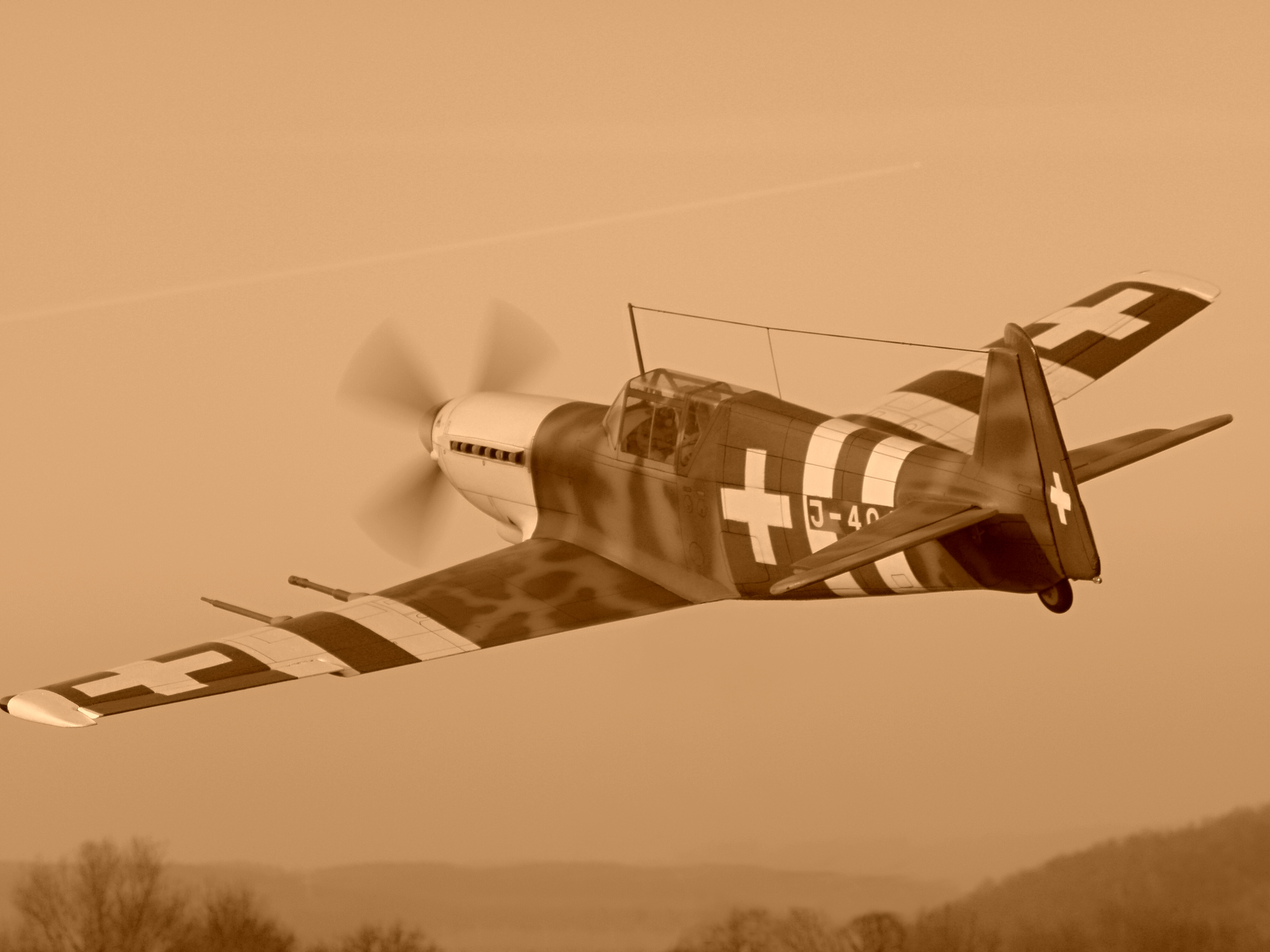 Doflug D-3802A